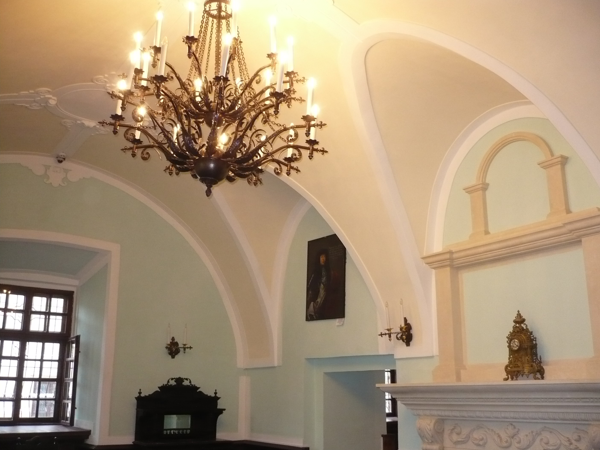 Zbaraż, sala zamku